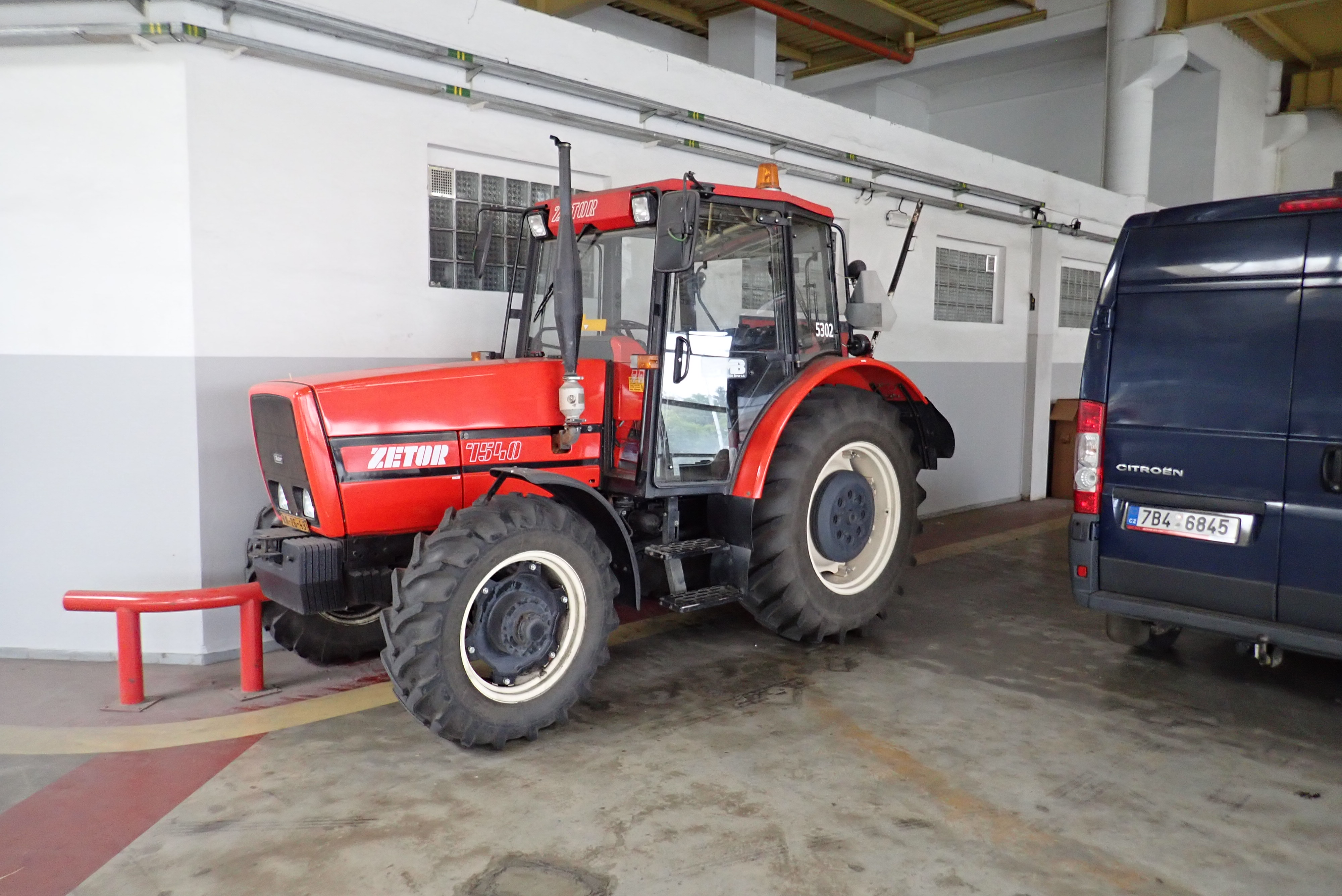 Traktor používaný na manipulaci s vozidly ve vozovně Komín